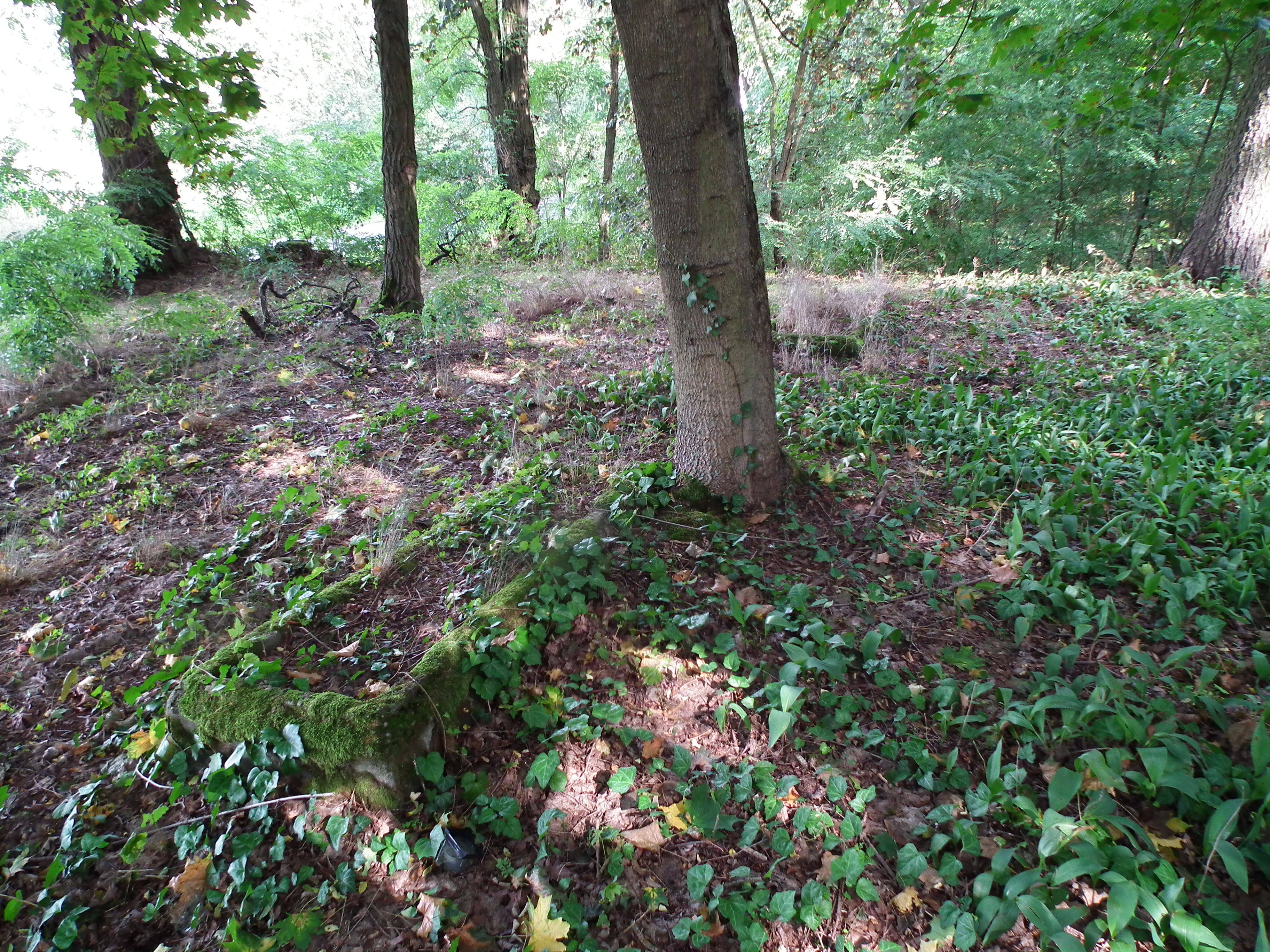 Pozostałości cm. ewang. w Potrzanowie (przy szosie Potrzanowo - Budziszewice). Jeden z trzech w miejscowości.